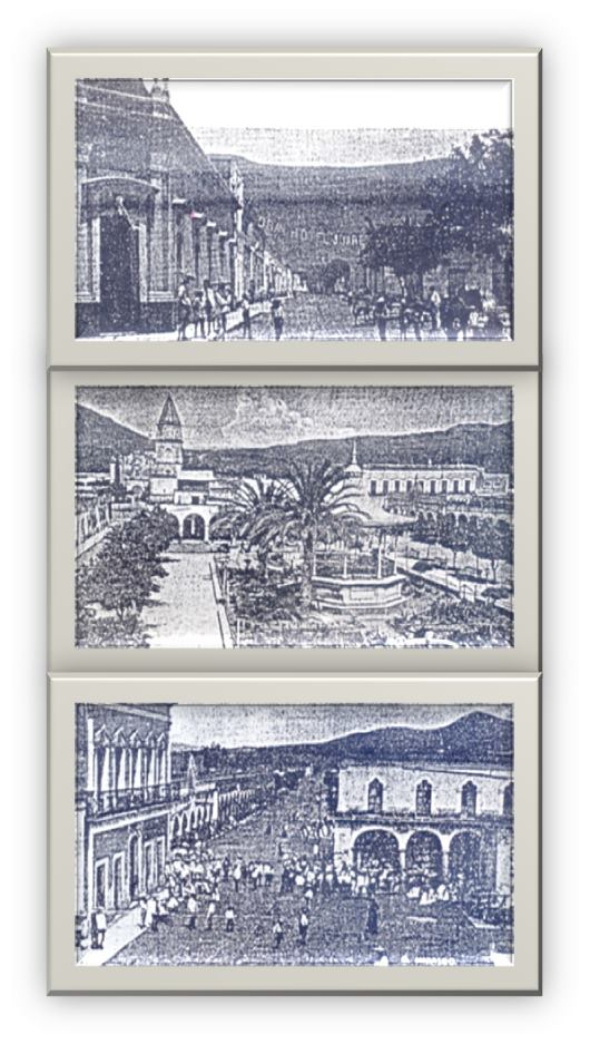 Finales del siglo XIX